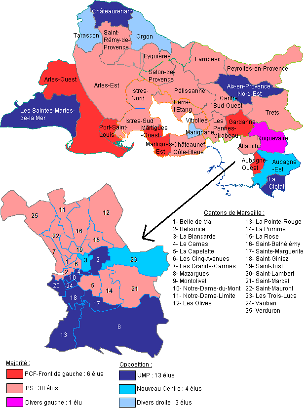 Étiquettes politiques des conseillers généraux des Bouches du Rhône suite aux cantonales de 2011